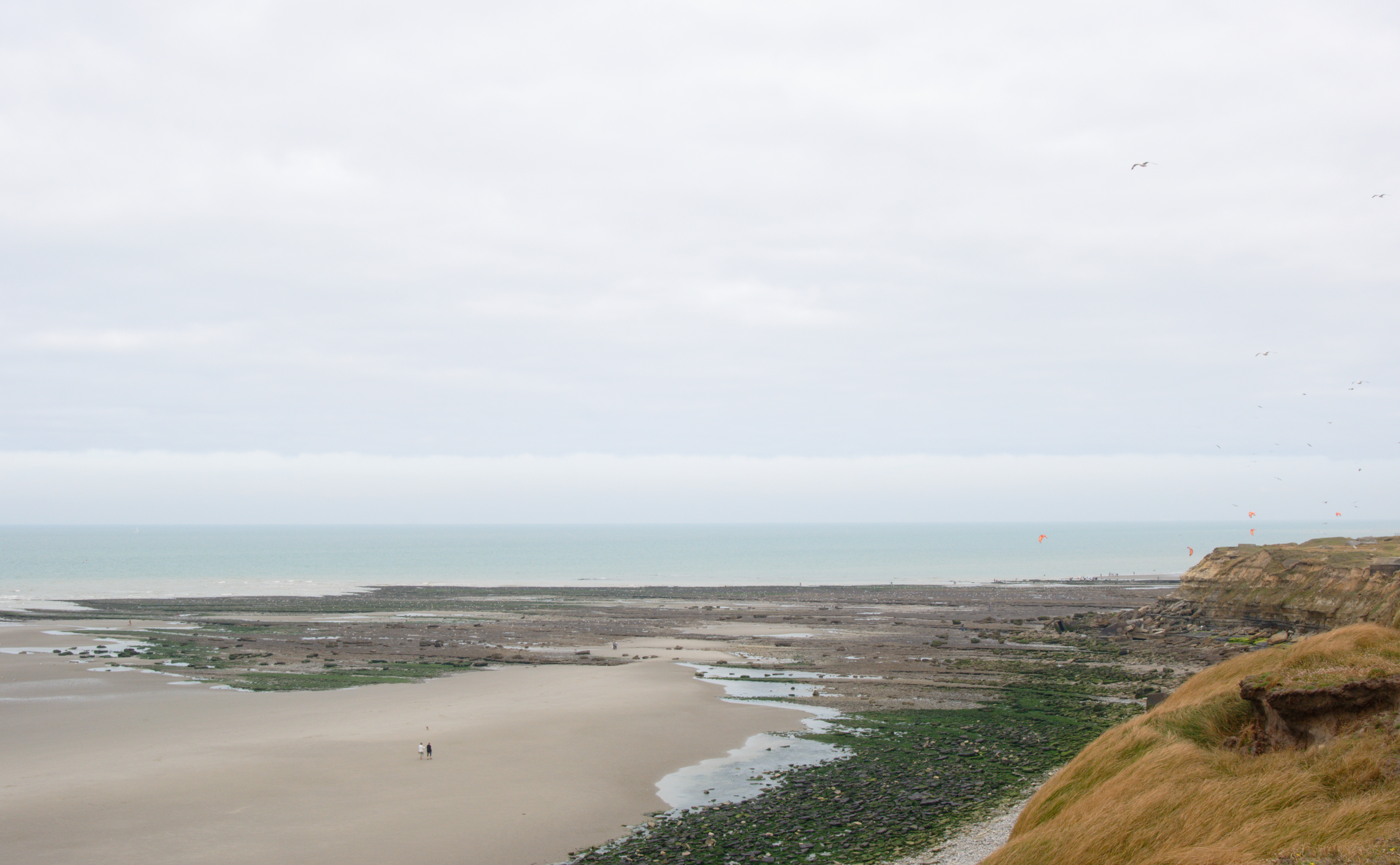 Randonnée au dessus des falaises au nord de Wimereux